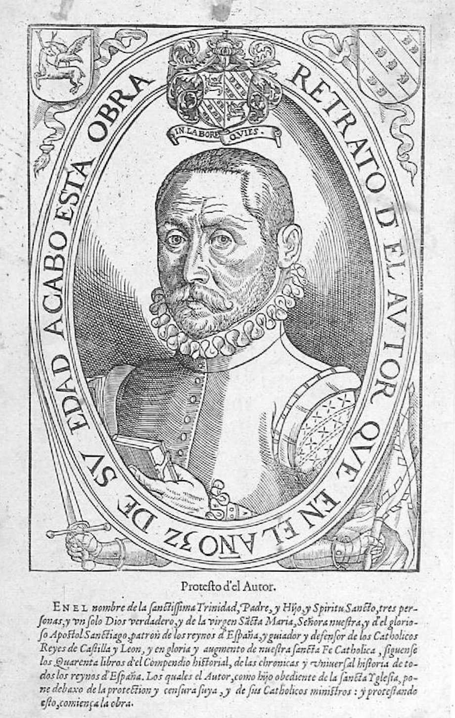 Esteban de Garibay y Zamalloa, retrato del autor al frente del Compendio historial de las chronicas y universal historia de todos los reynos de España, impreso por Cristóbal Plantino, a costa del autor, Amberes, 1571